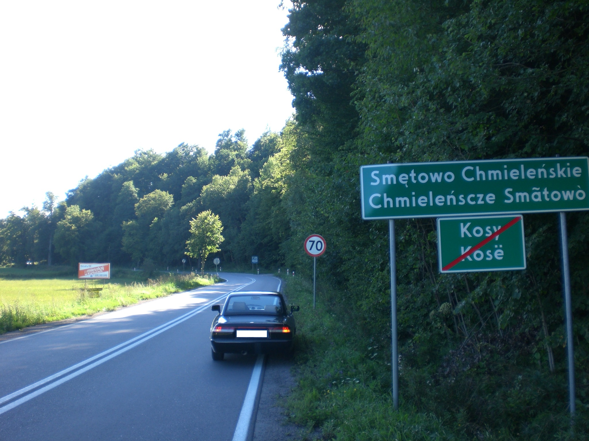 Smętowo Chmielińskie